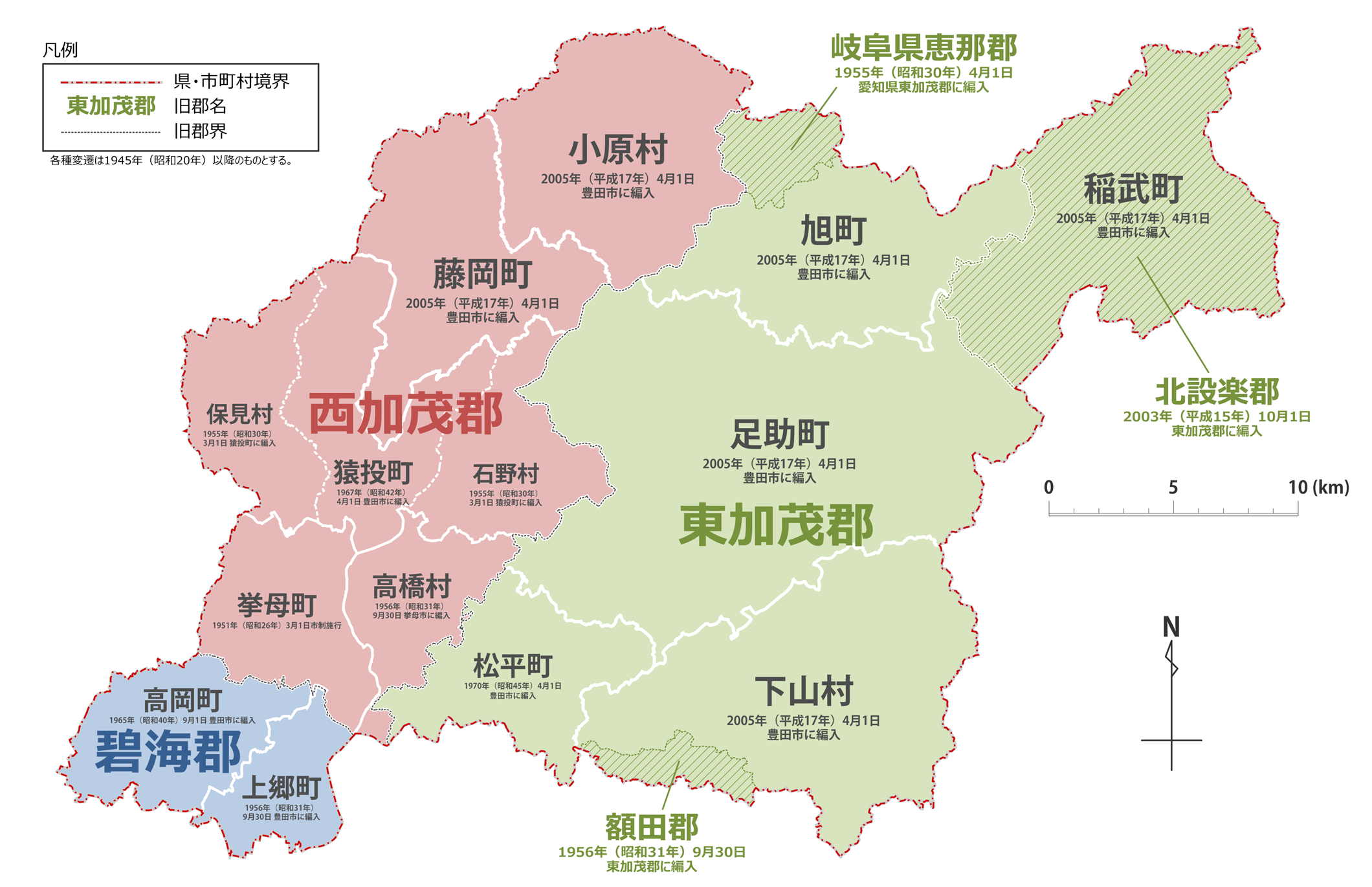 豊田市における市町村合併経緯図